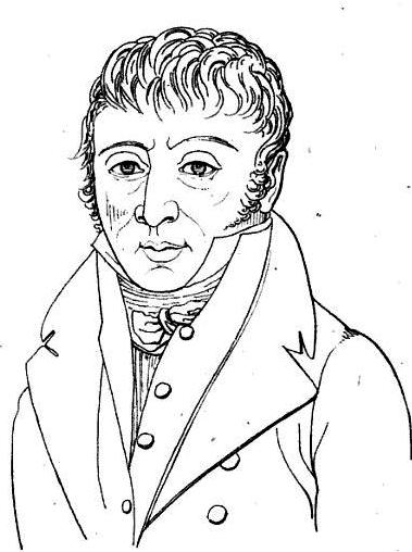 Kératry, député